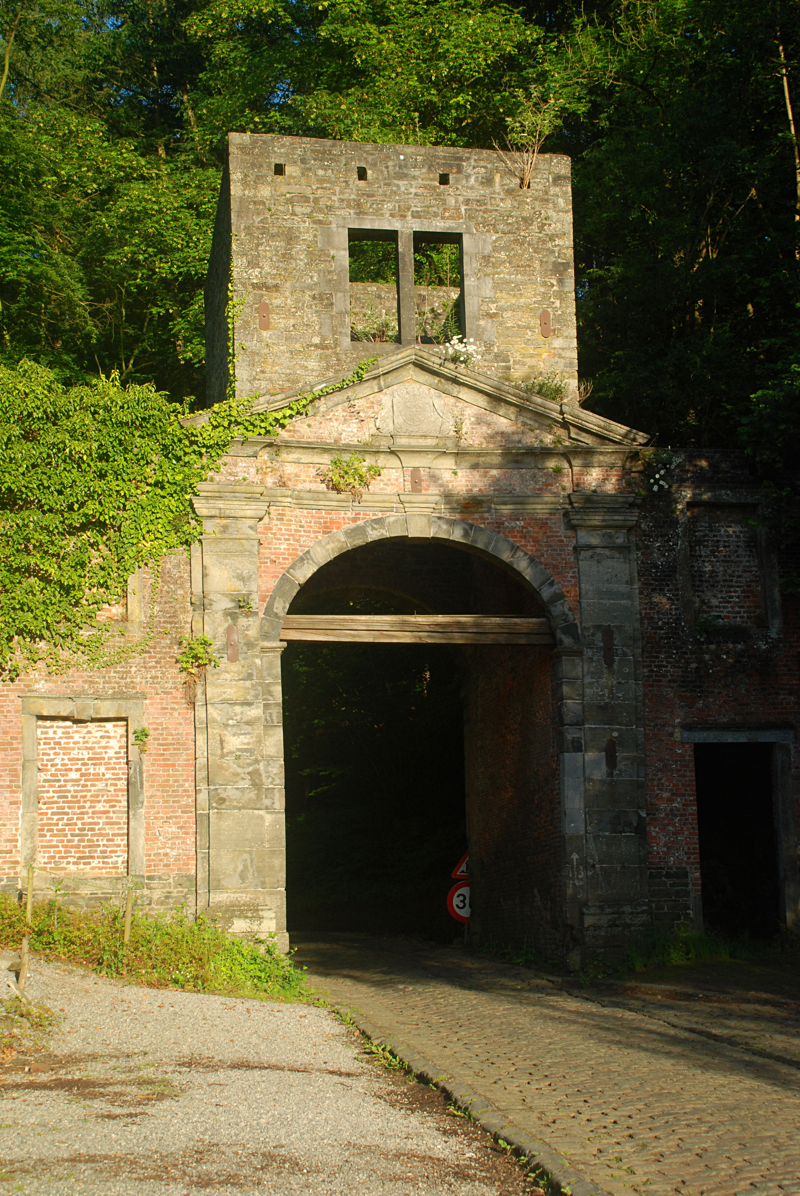 Belgique - Brabant wallon - Villers-la-Ville - Porte de Namur